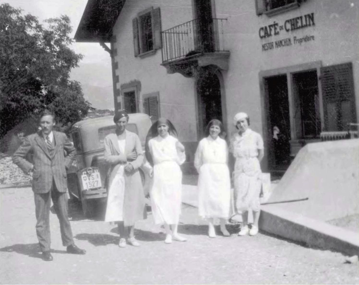 Ouverture du préventorium Saint-Philomène de Chelin en 1934 avec Sœur Claire au centre.